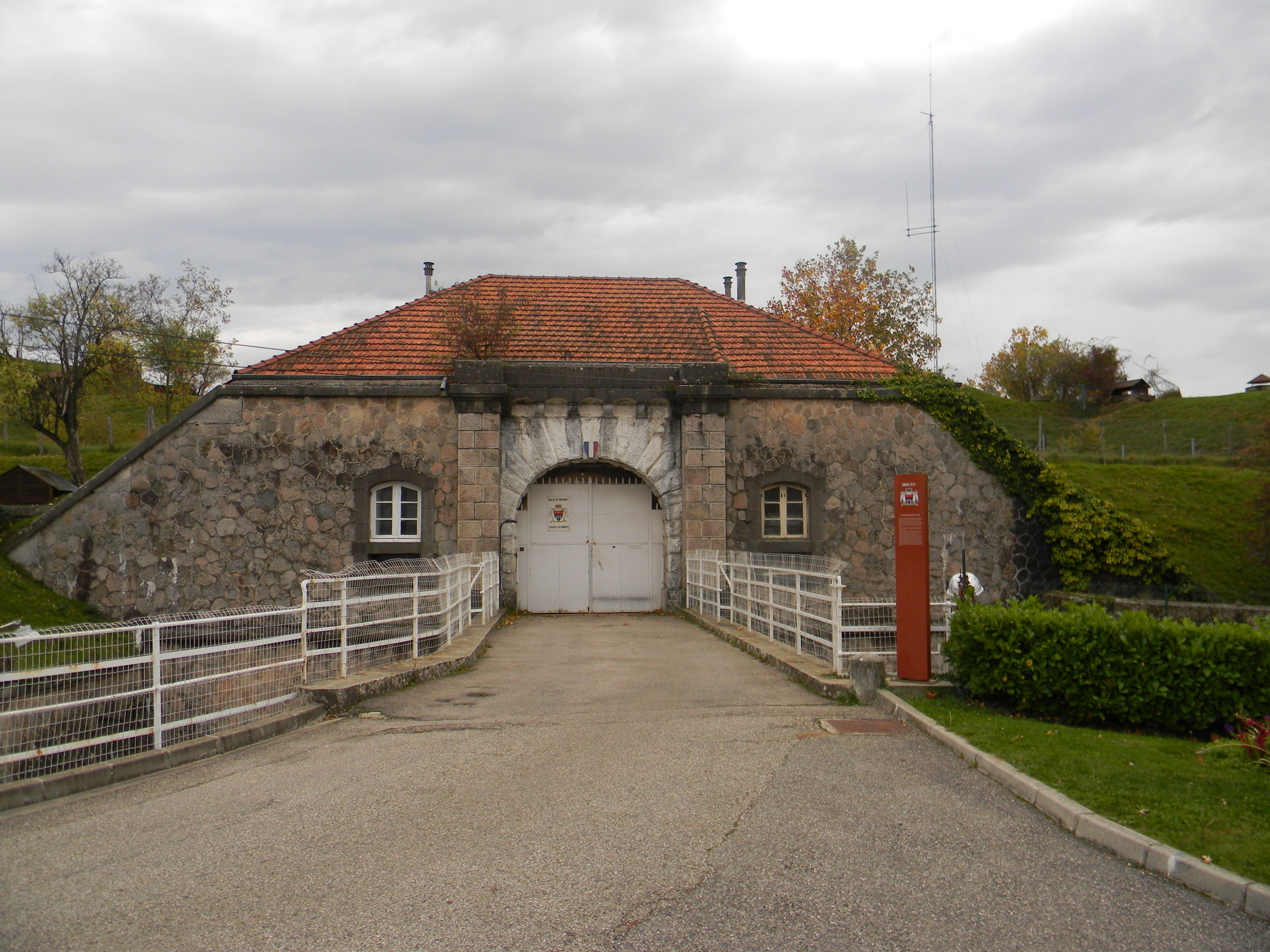 L'entrée (située à l'arrière) du Fort de Champvillard.